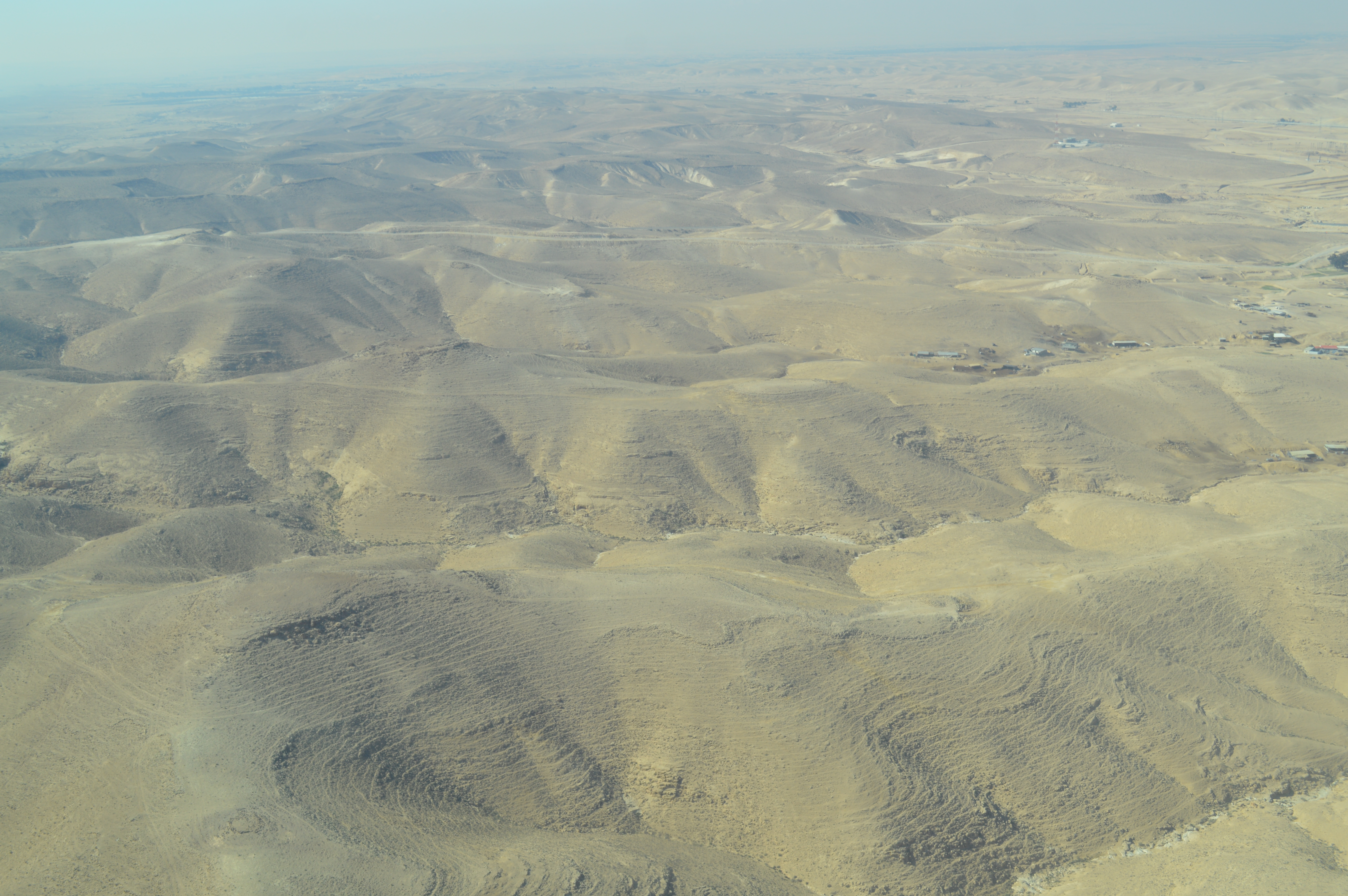 צילום אוויר - הנגב הצפוני